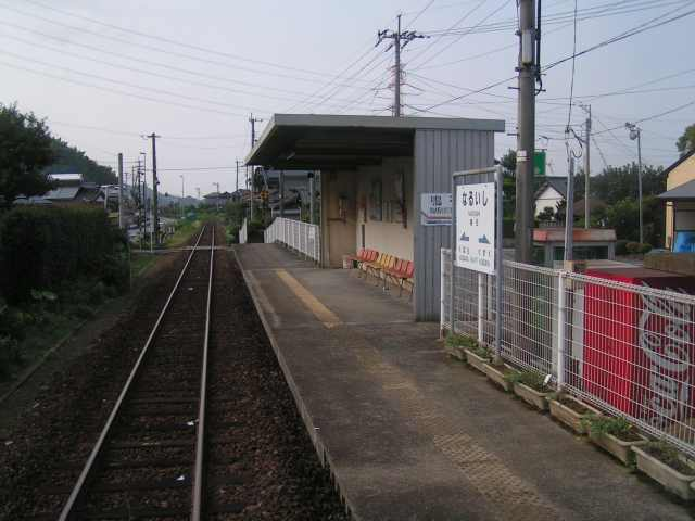 鳴石駅 投稿者が撮影(2006/08/28)